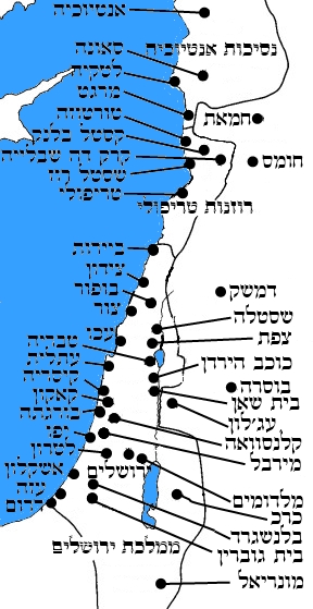 מפת המבצרים הצלבניים בלבנט